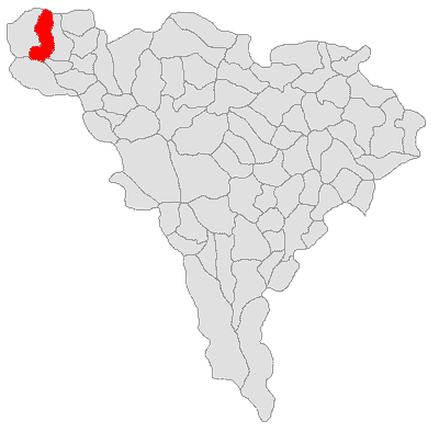 Categorie:Hărţi ale judeţului Alba